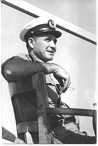 אל"מ יצחק רהב על גשר משחתת